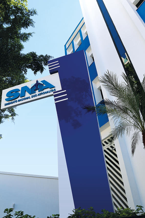 Fotografia da sede do Sindicato Nacional dos Aeronautas - SNA. São Paulo, 2019.